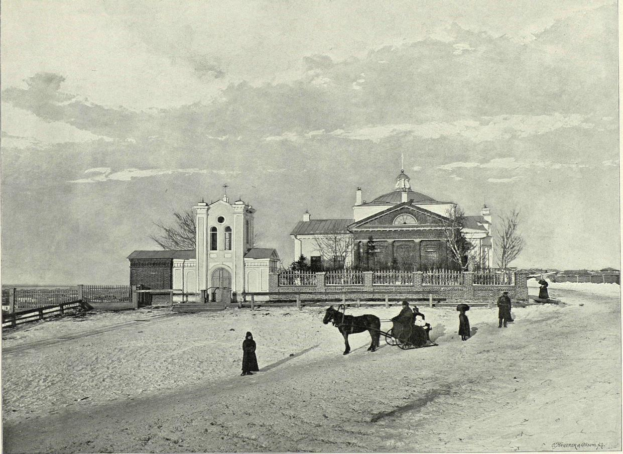 Томск. Римско-католический костёл